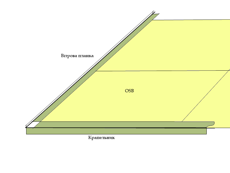 Бітумна Черепиця Порядок Монтажу 1